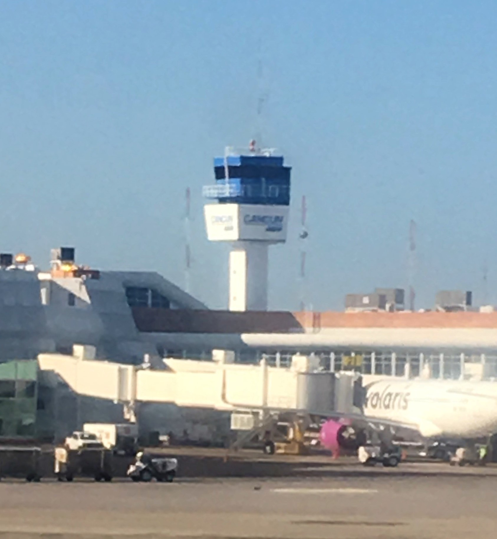 Foto realiazada personalmente desde el aeropuerto.